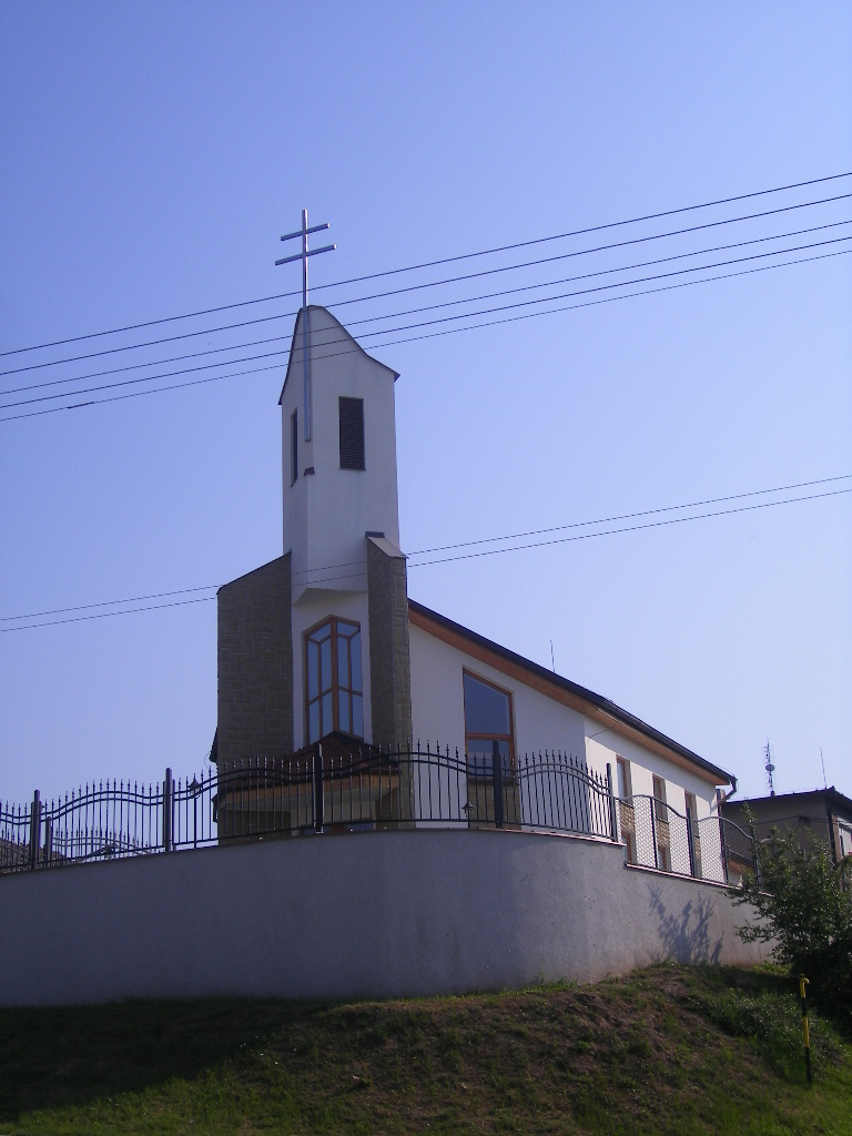 Búcs - katolikus templom